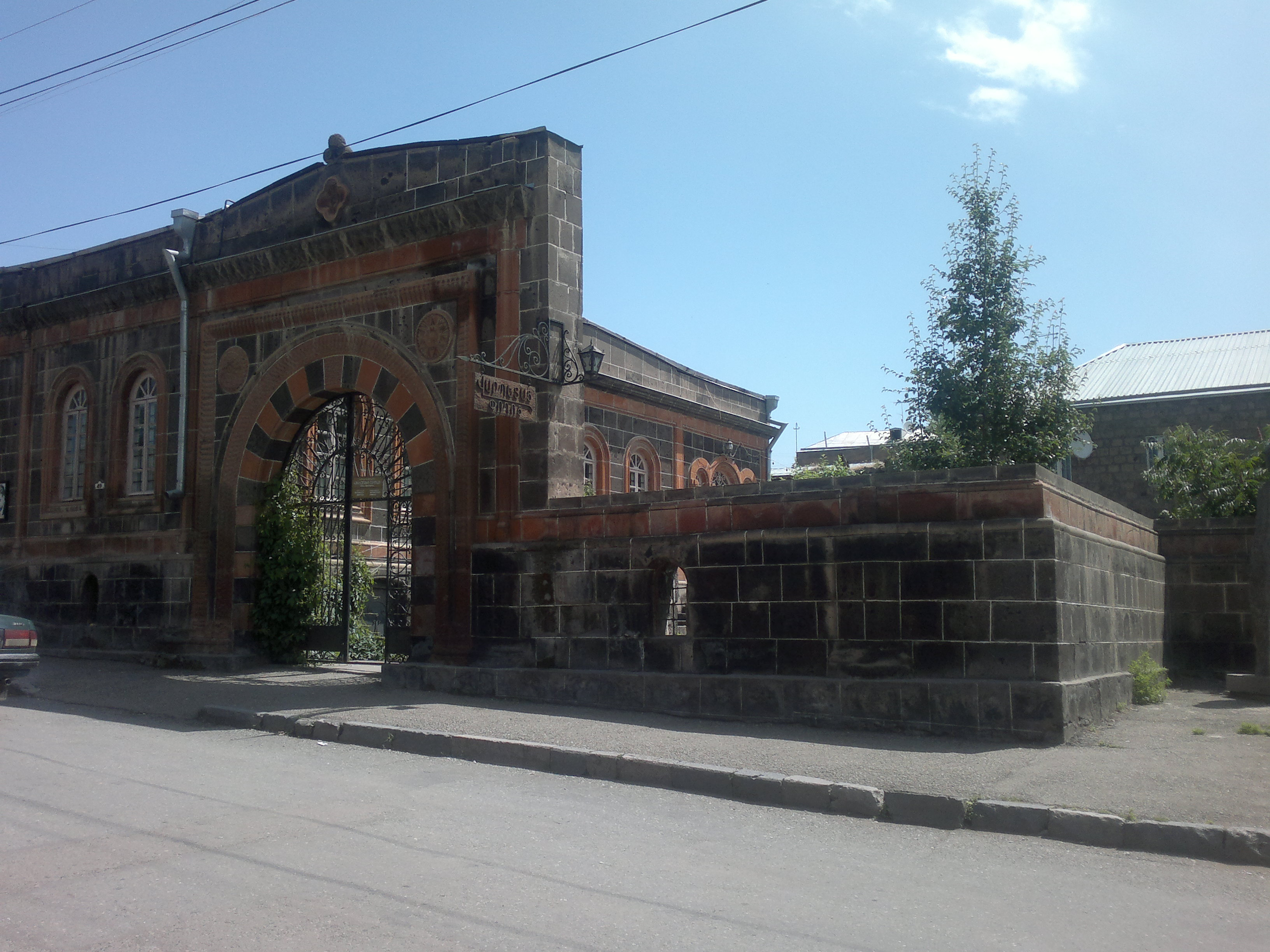 Շիրազի տուն թանգարանը Գյումրիում